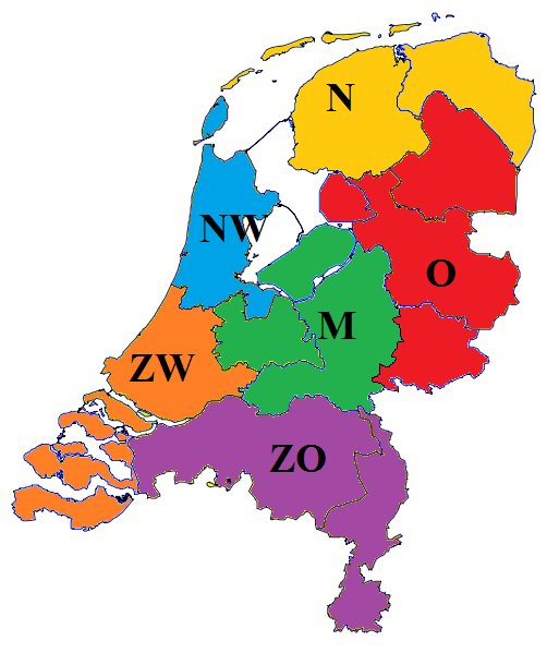 Nederland ingedeeld naar waarschuwingsregio's zoals gehanteerd door het KNMI.